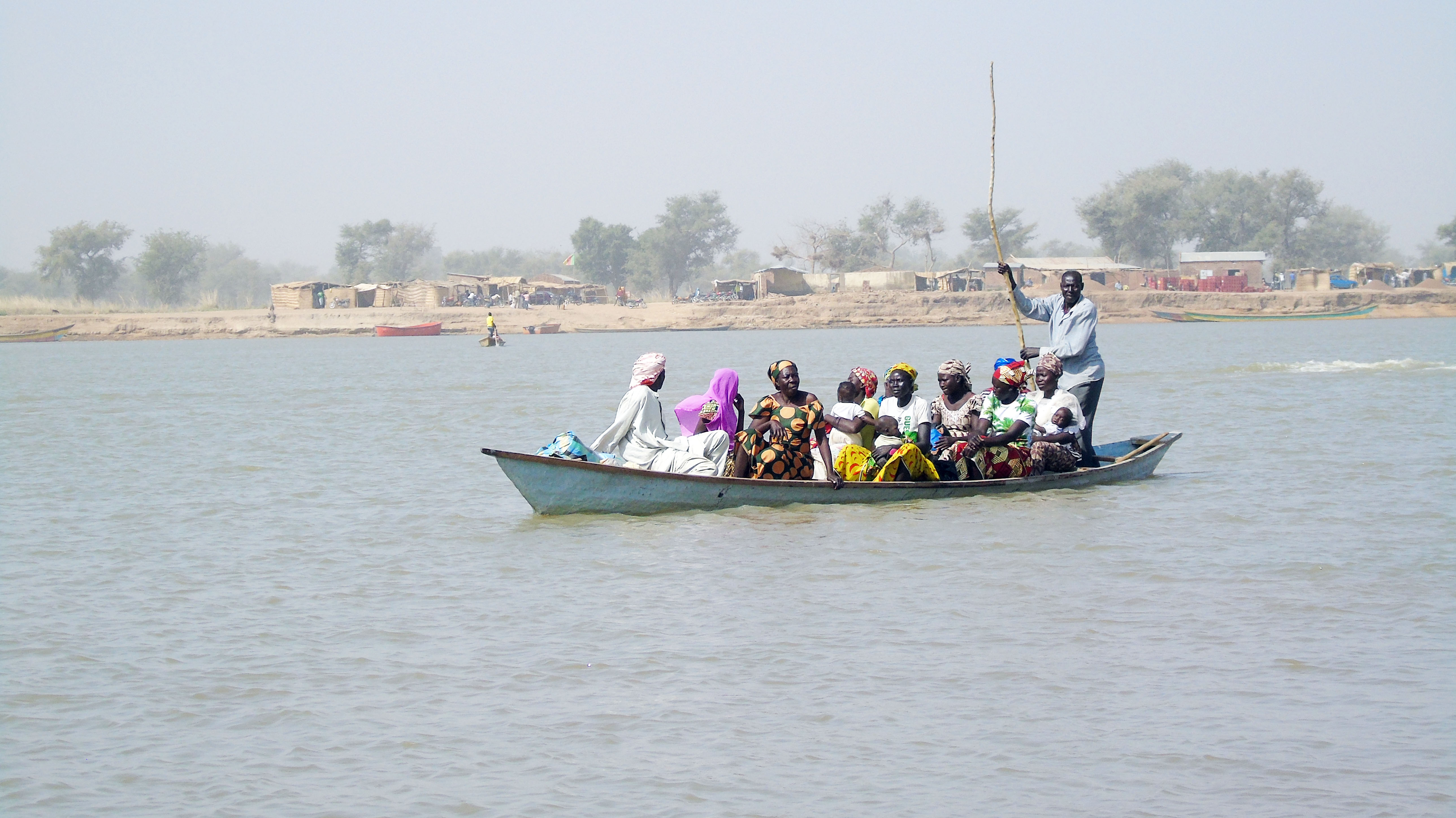 C'est une photo du transport en pirogue prise sur le fleuve Logone entre Bongor(Tchad) et Yagoua(Cameroune) This is an image with the theme "Africa on the Move or Transport" from: Chad